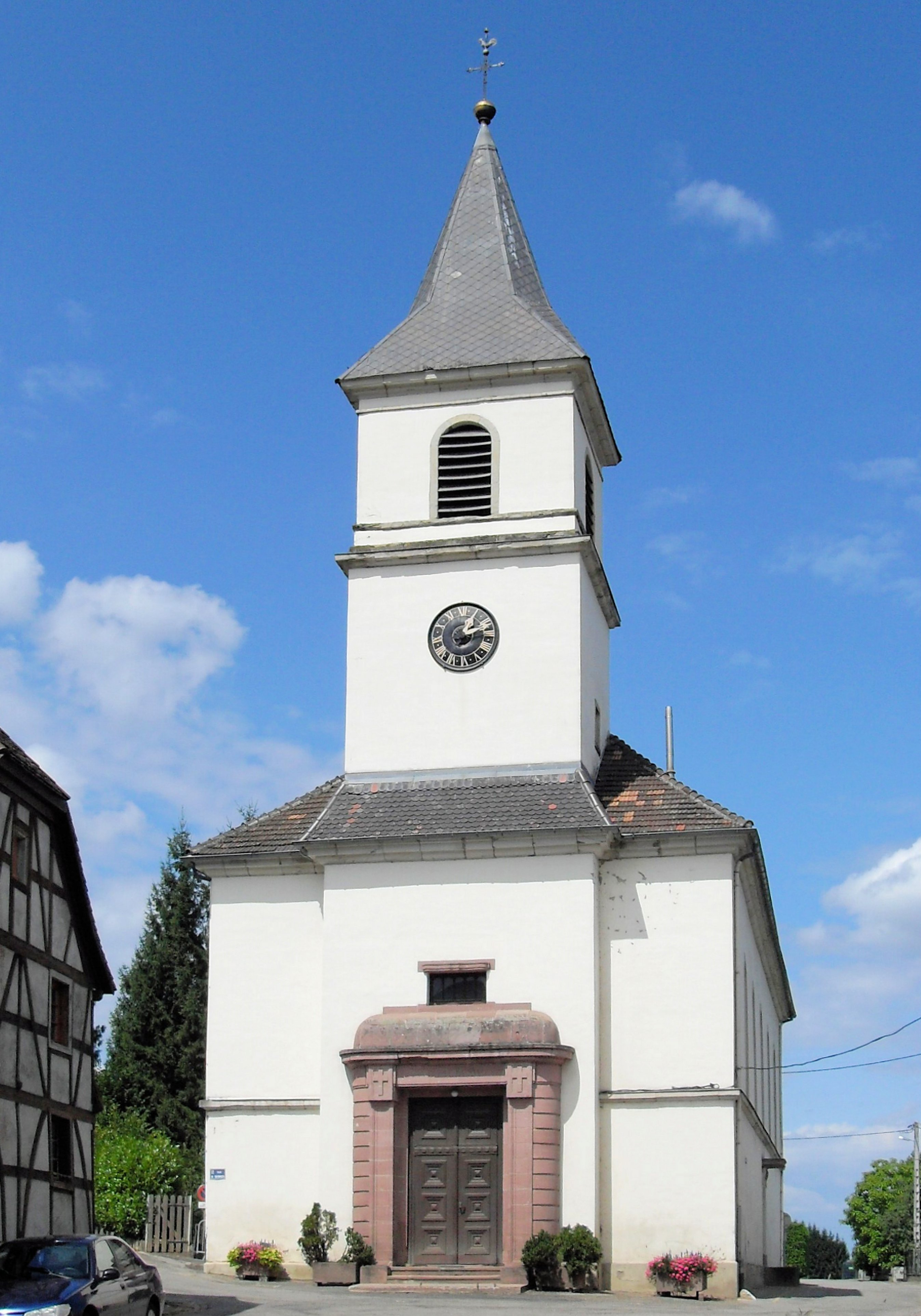 L'église Saint-Georges à Durmenach